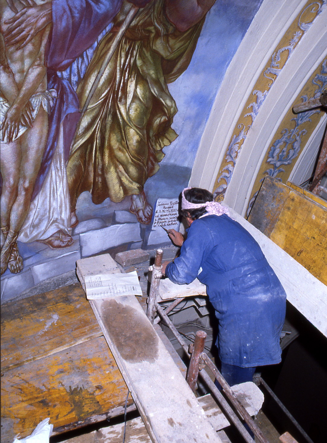 Federico Bellomi firma la grande pittura murale SAN MATTEO IN GLORIA del catino absidale della chiesa parrocchiale di Quaderni (Vr) 1984